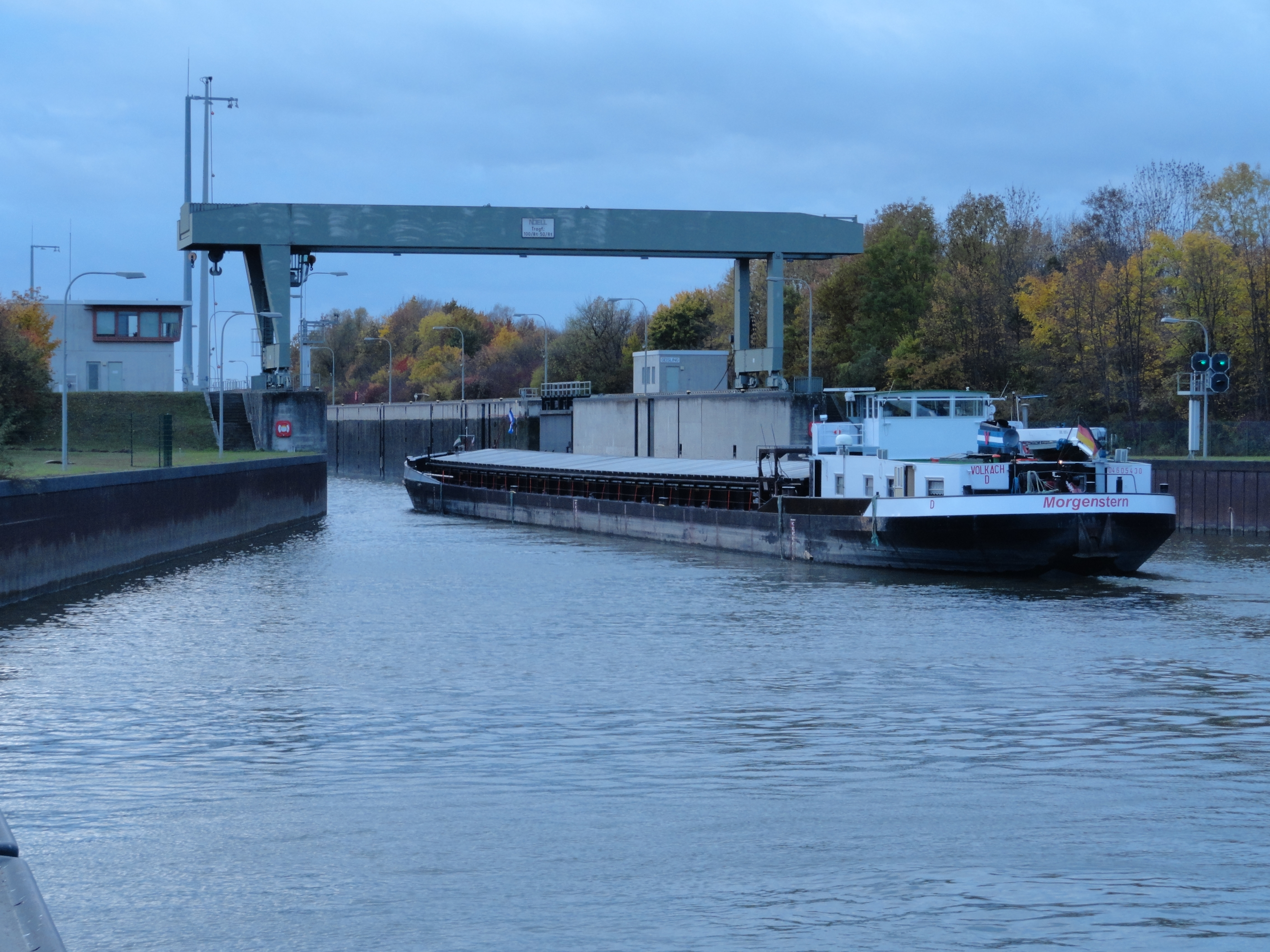 Schleuse Geisling, Unterwasser, Einfahrt